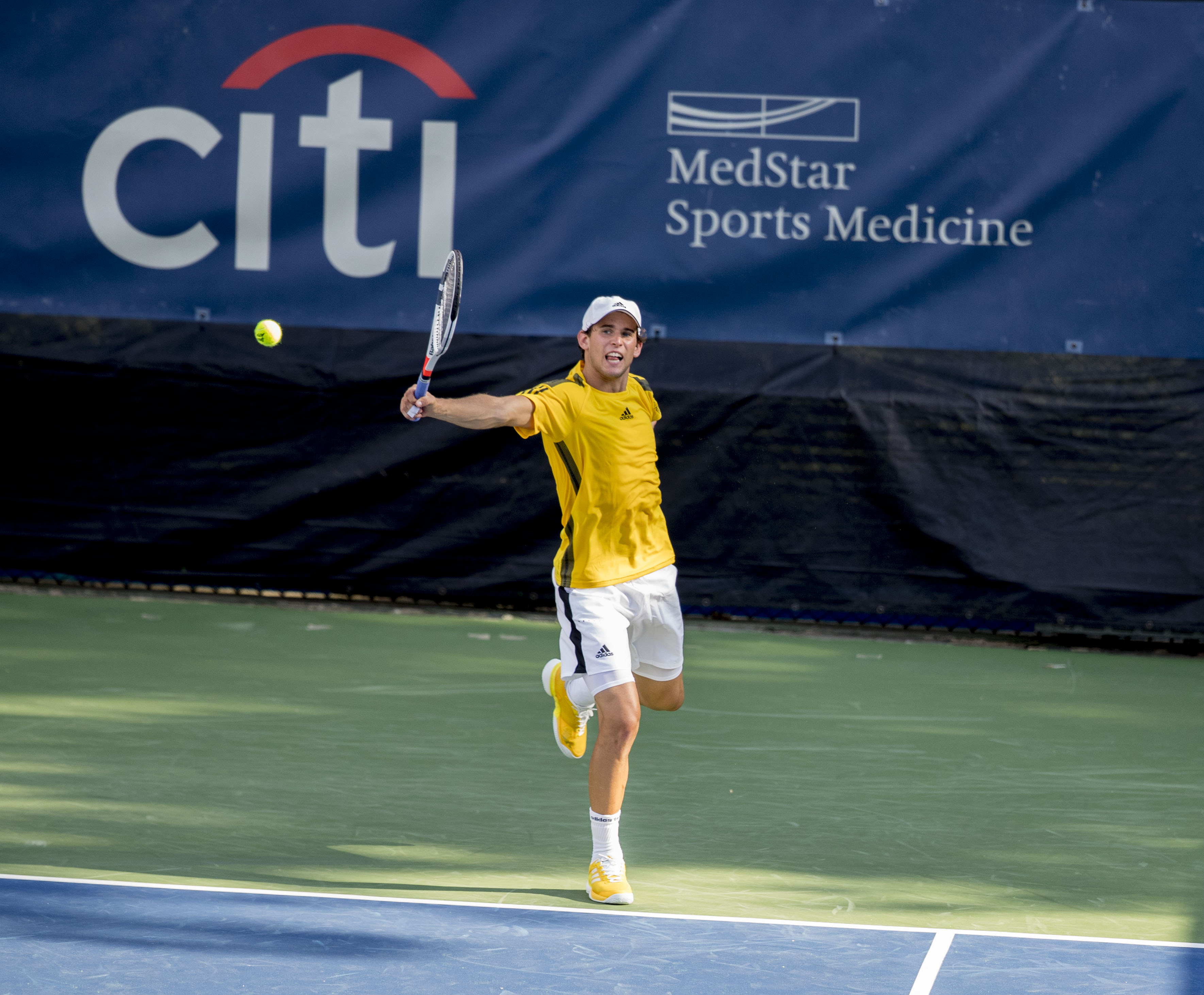 Citi Open Tennis 2017